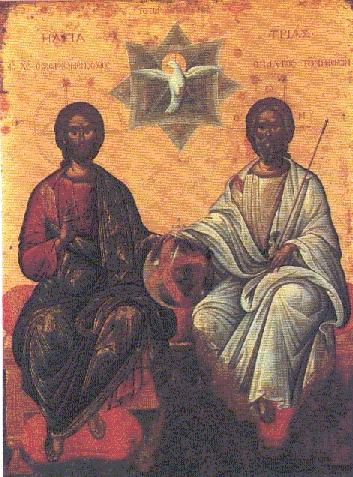 Православна икона Свете Тројице.